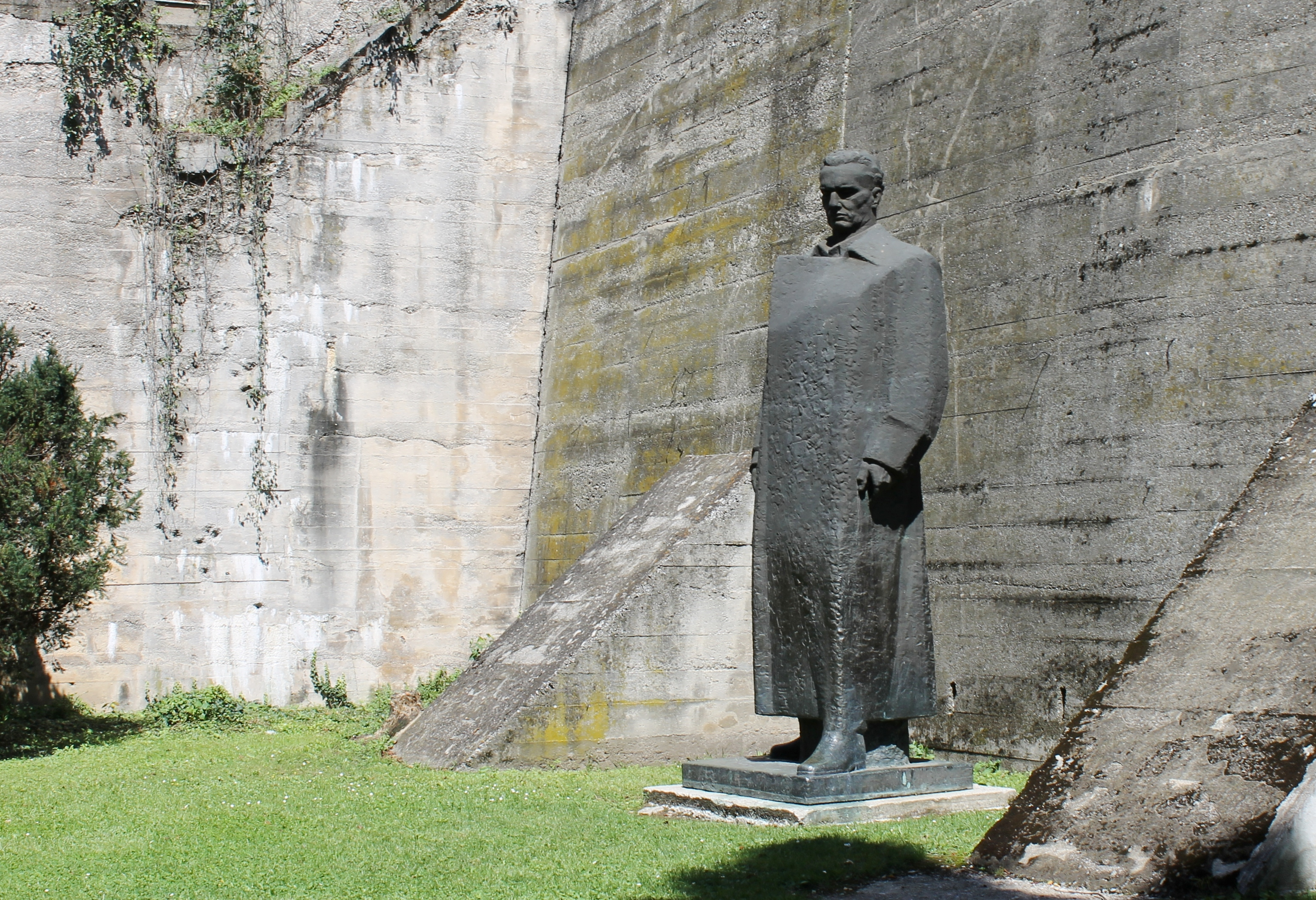 Spomenik Josipu Brozu Titu u Užicu, rad vajara Franje Kršinića